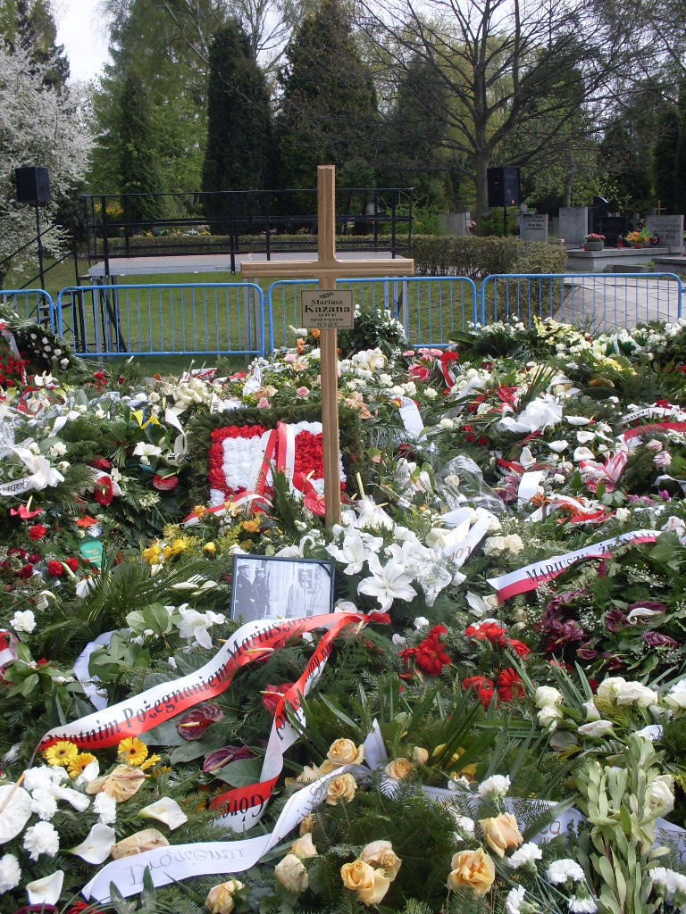 Nagrobek Mariusza Kazany na Powązkach